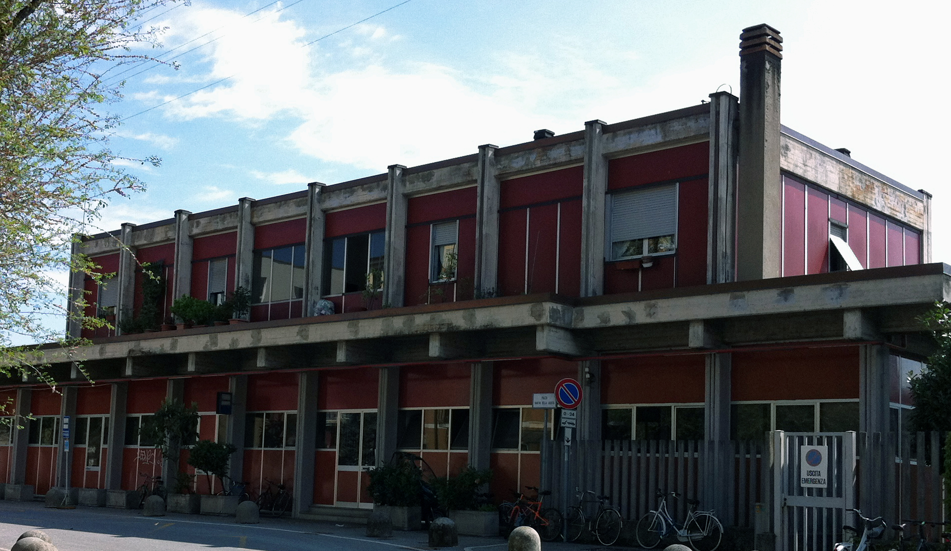 Stazione di Arcore FS (1984) prima del restyling del 2015